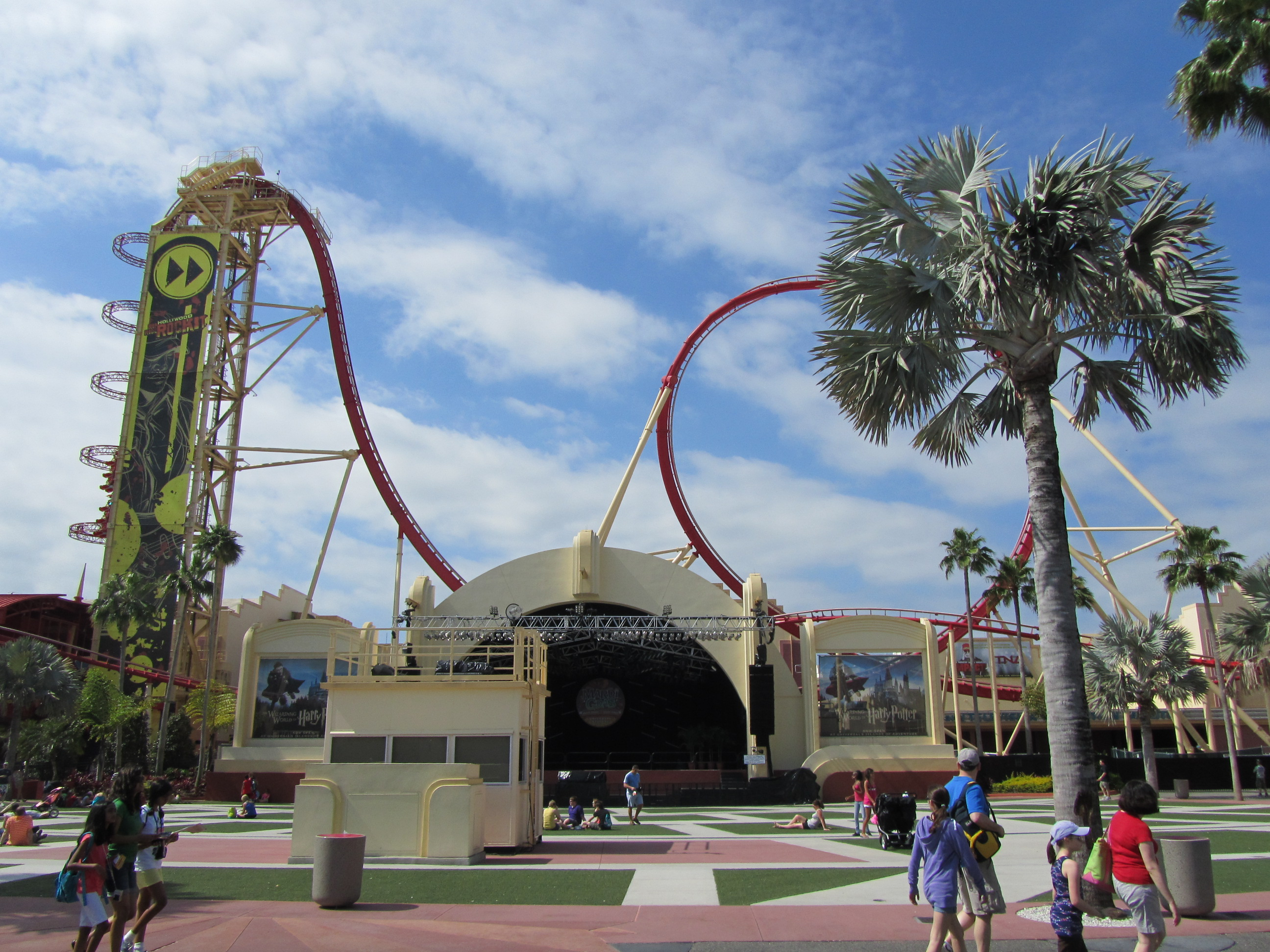 Universal Orlando Resort